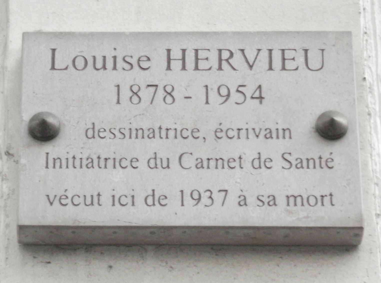 Plaque apposée au n° 55 de la rue du Cherche-Midi, Paris 6e. « Louise Hervieu, 1878-1954, dessinatrice, écrivain, initiatrice du carnet de santé, vécut ici de 1937 à sa mort. »